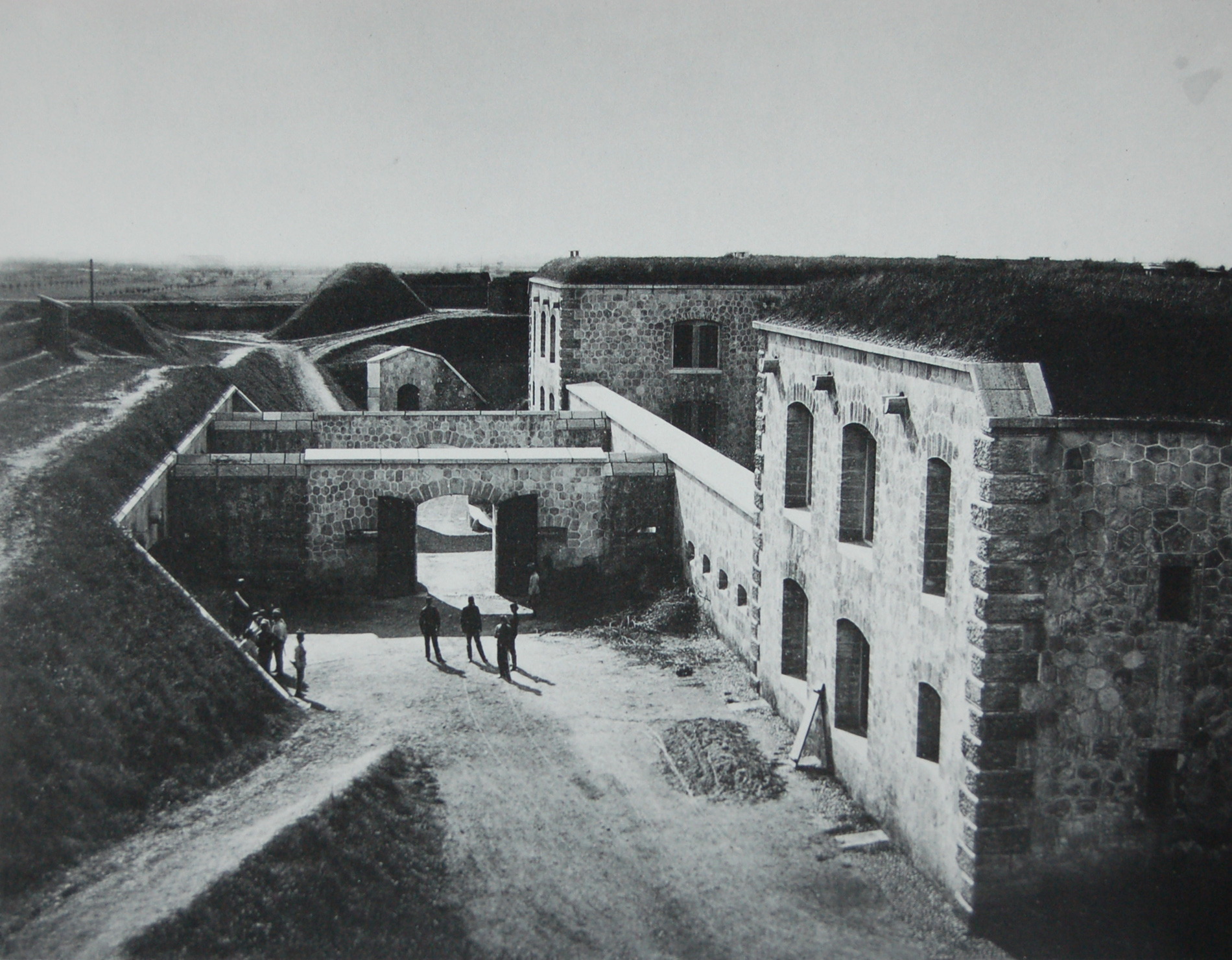 Il Forte Lugagnano, parte della fortezza austroungarica di Verona, nel 1863. Foto di Moritz Lotze (1809-1890).